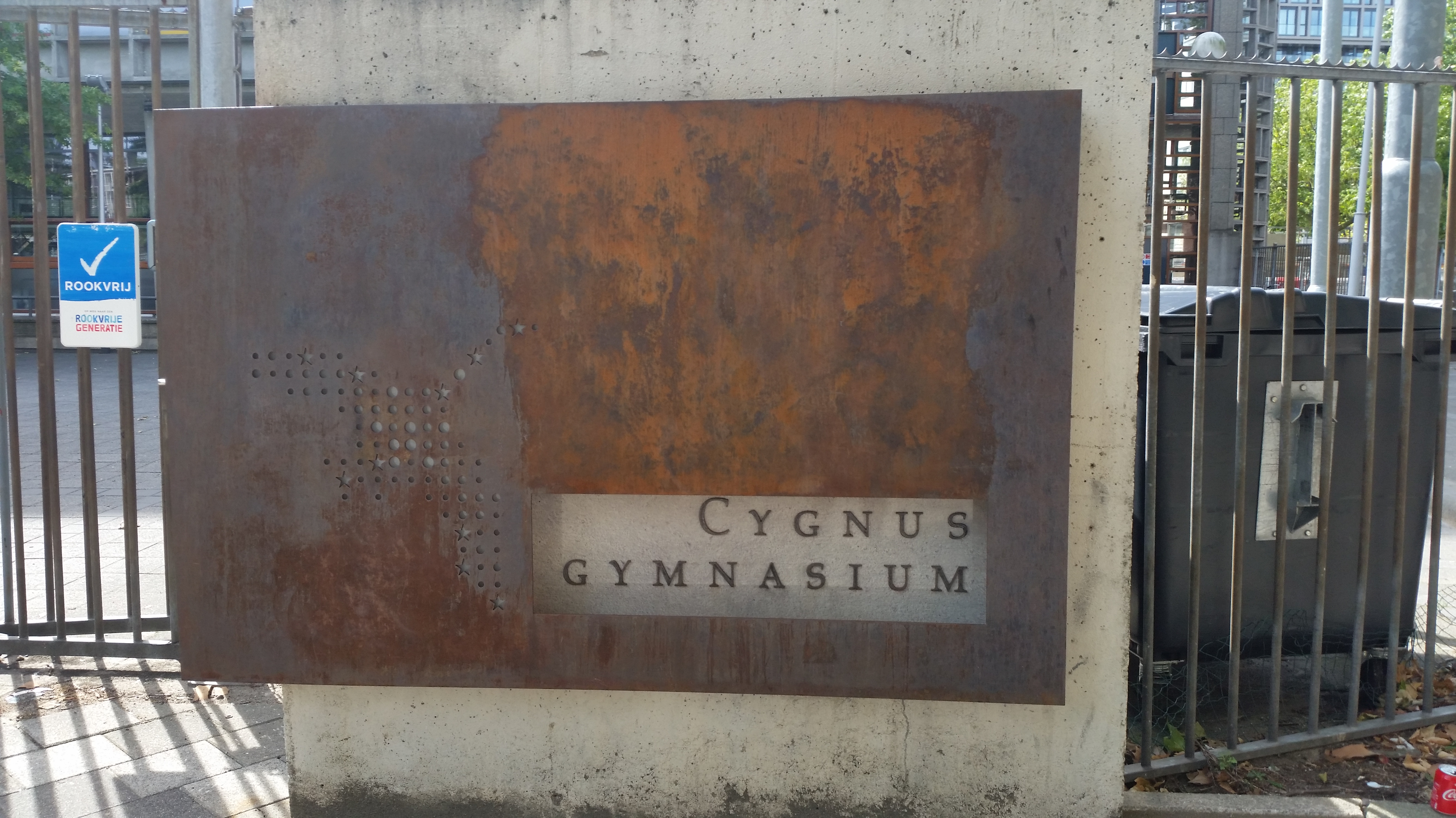 Vrolikstraat 8 (gate); toegangspoort tot terrein Vrolikstraat 8, Amsterdam; dit onderdeel de naamplaat maakt geen deel uit van het monument